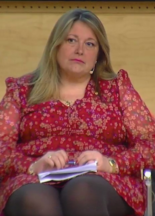 Jornada "La nueva PAC". Intervención de representantes del Parlamento Europeo.